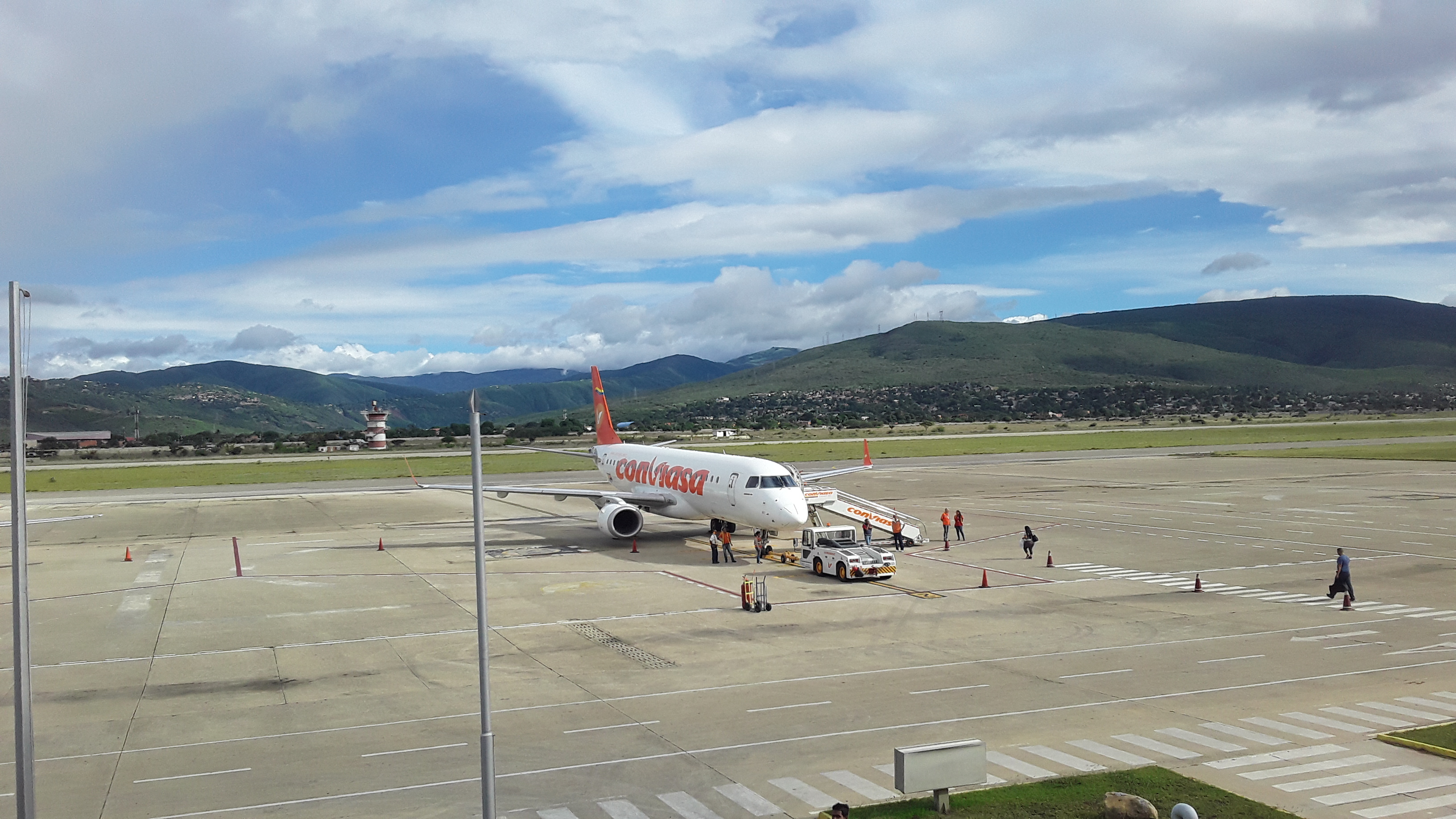 Embraer 190 de la aerolínea venezonala Conviasa en el Aeropuerto Internacional Jacinto Lara de Barquisimeto por Eduardo José Pérez